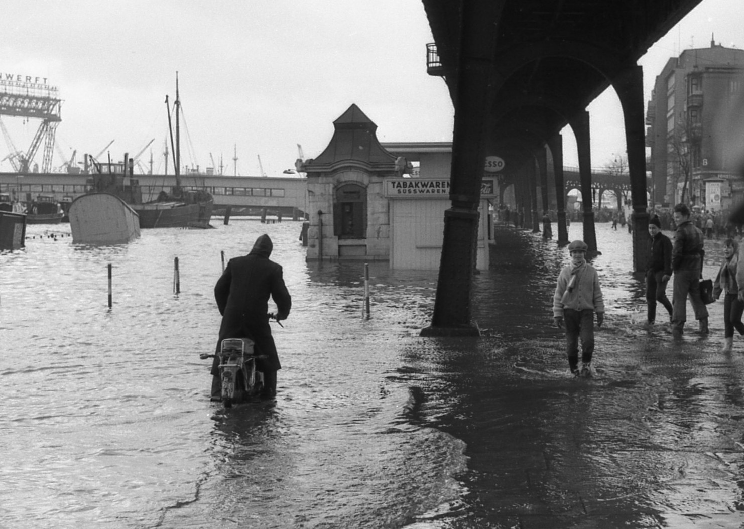 Sturmflut, überschwemmter Baumwall